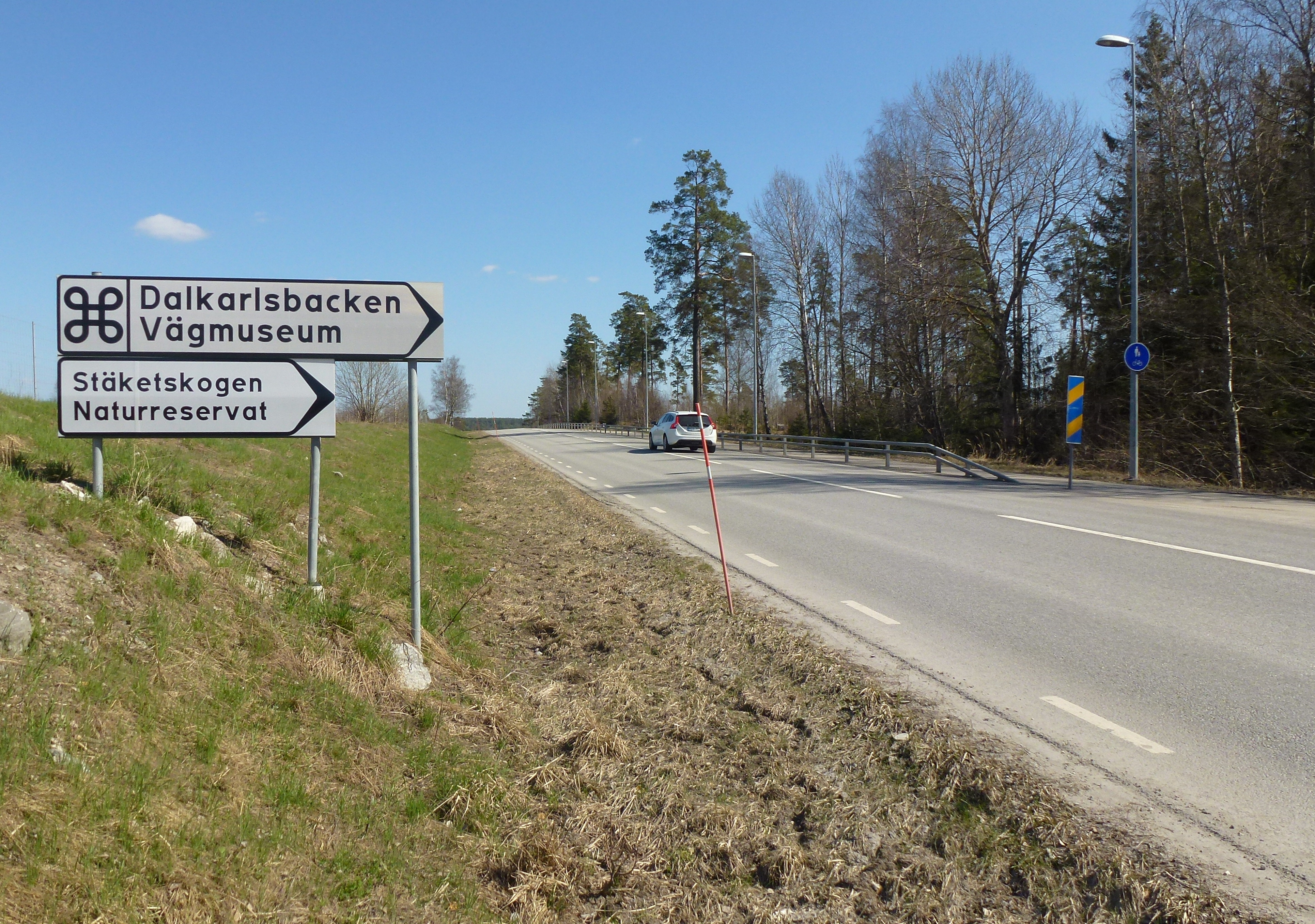 Dalkarlsbacken vägmuseum och Stäketskogens naturreservat, vägskylt vid gamla Enköpingsvägen